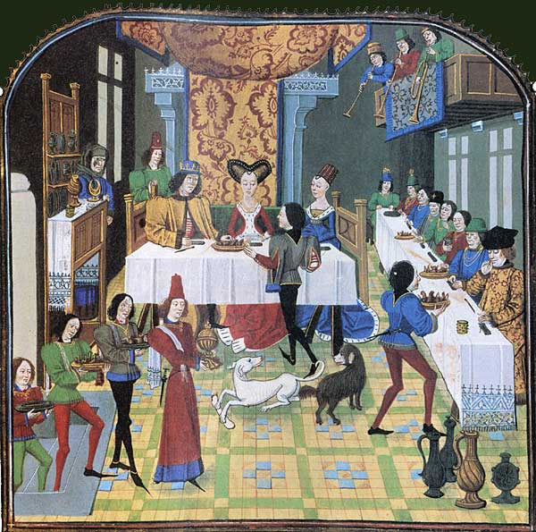 Enluminure extraite d’Histoire d'Olivier de Castille et d'Artus d'Algarbe, folio 181v. La table d'honneur est isolée sous un dais, tandis que le gros des convives se répartit le long d'une table, dont ils n'occupent qu'un côté. Le ballet des serviteurs est mené par le maître d'hôtel, tandis qu'au buffet et près du prince veillent d'autres officiers de bouche, prêts à répondre à ses moindres désirs. Des musiciens égayent le repas.